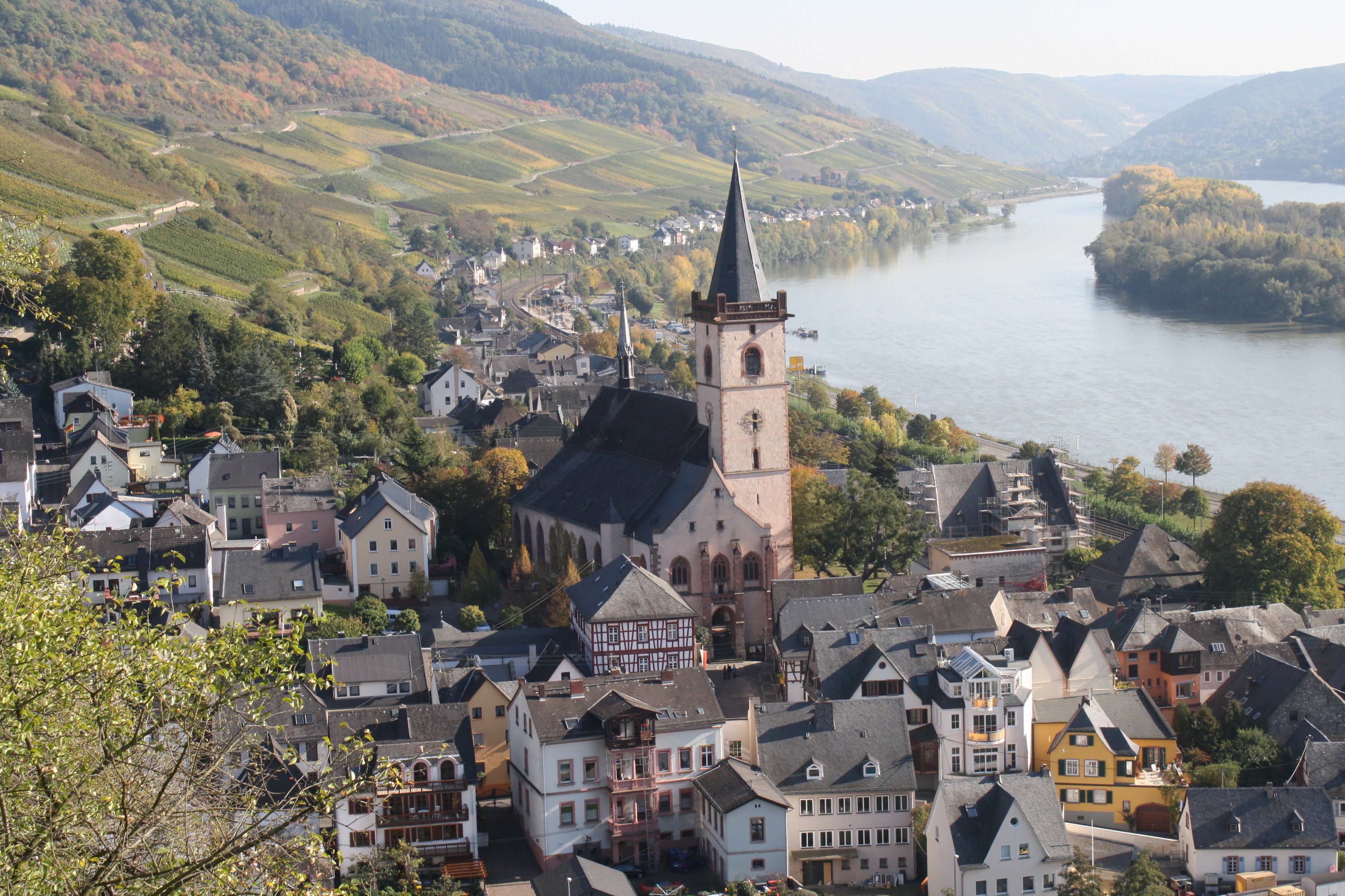 Weinstadt Lorch am Rhein mit St. Martinskirche